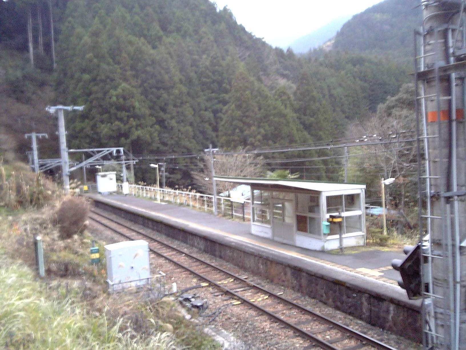 相月駅ホーム